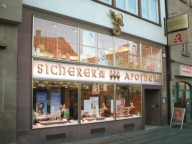 Sicherer'sche Apotheke in der Kaiserstraße 32 am Marktplatz in Heilbronn, Fassadendetail